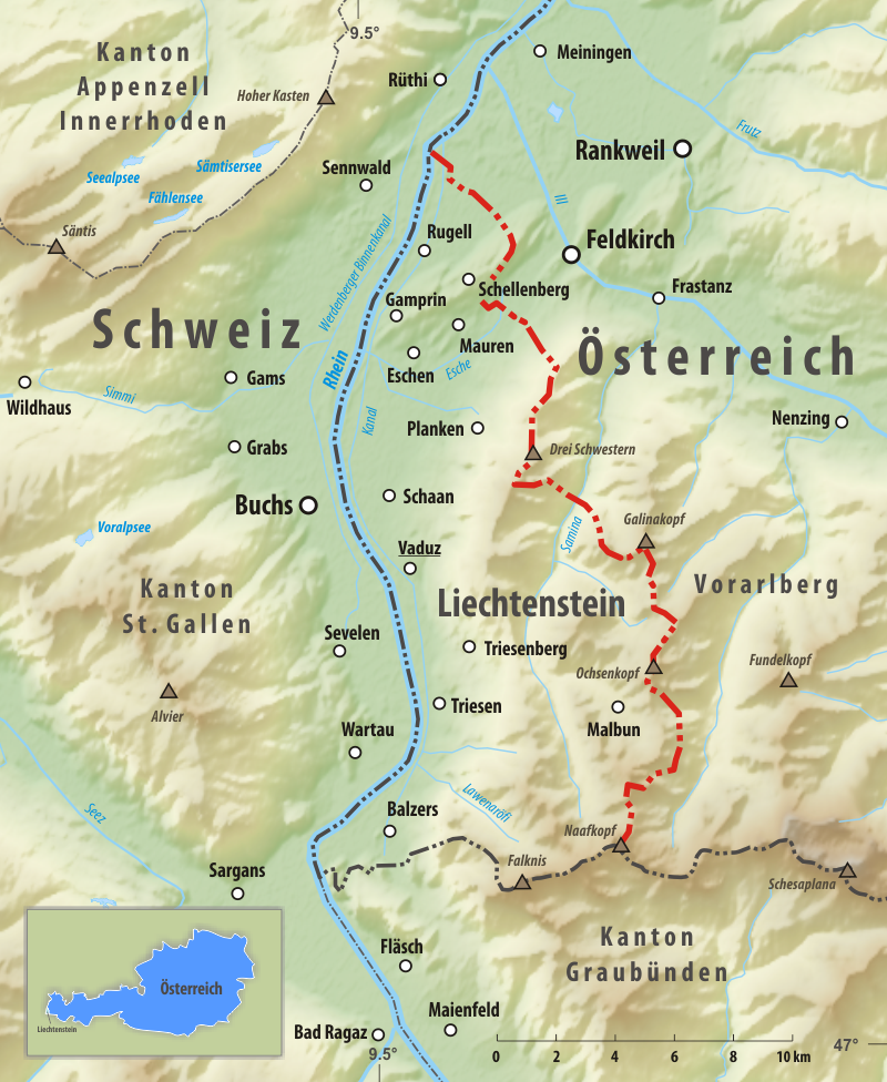 Reliefkarte des Grenzverlaufes zwischen Österreich und Liechtenstein Topographischer Hintergrund: NASA Shuttle Radar Topography Mission (public domain). SRTM3 v.2.